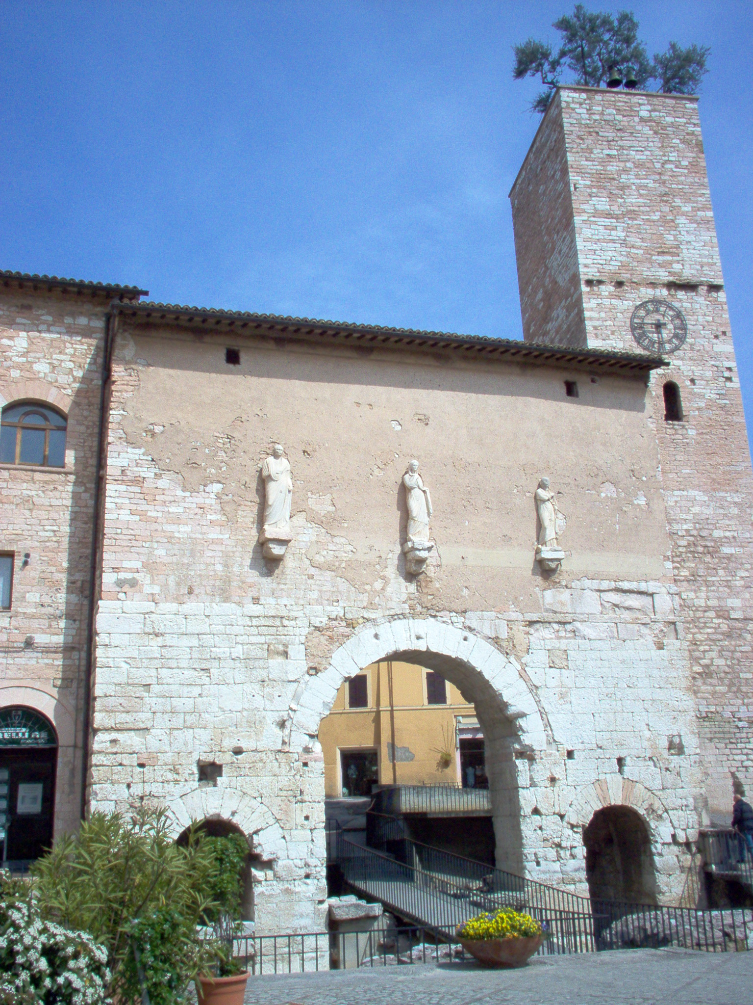 Spello, Porta Capitolina Photo by Attilio Stefano Funel (myself), April 1 2007